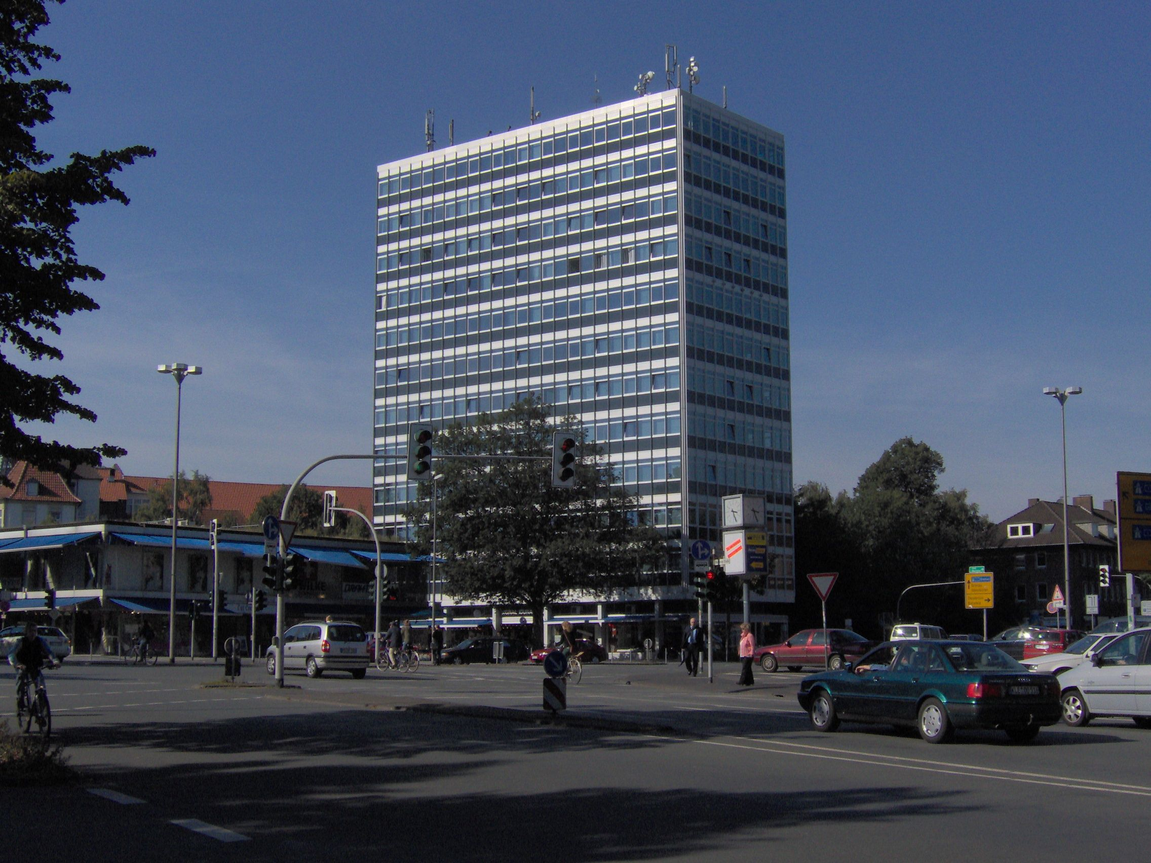 Servatiiplatz in Münster.